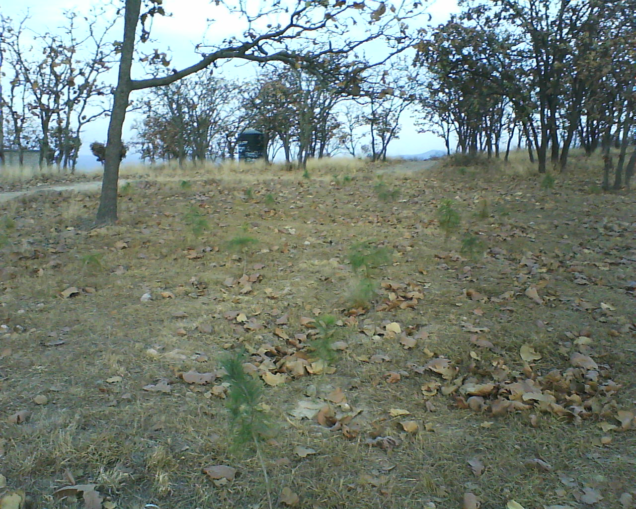 Zona reforestada por el Comité Salvabosque en el Nixticuil.